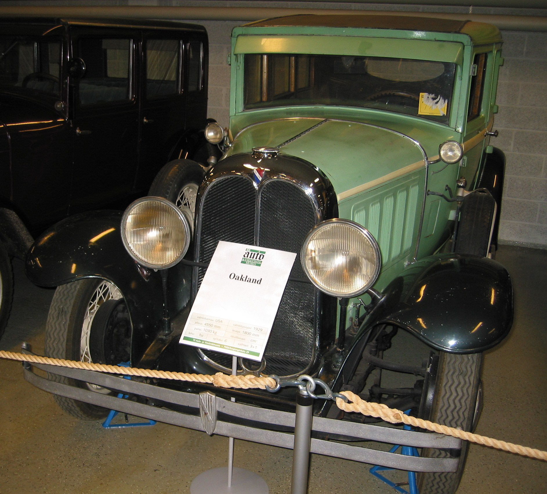 Oakland 1929